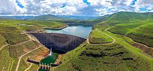 سد كاتسي